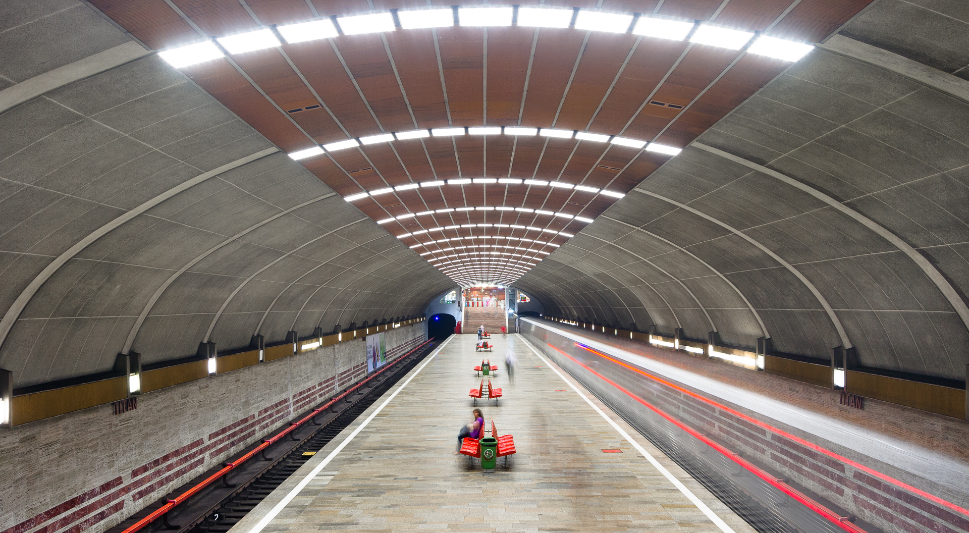 Statie Metrou - Titan, Bucuresti